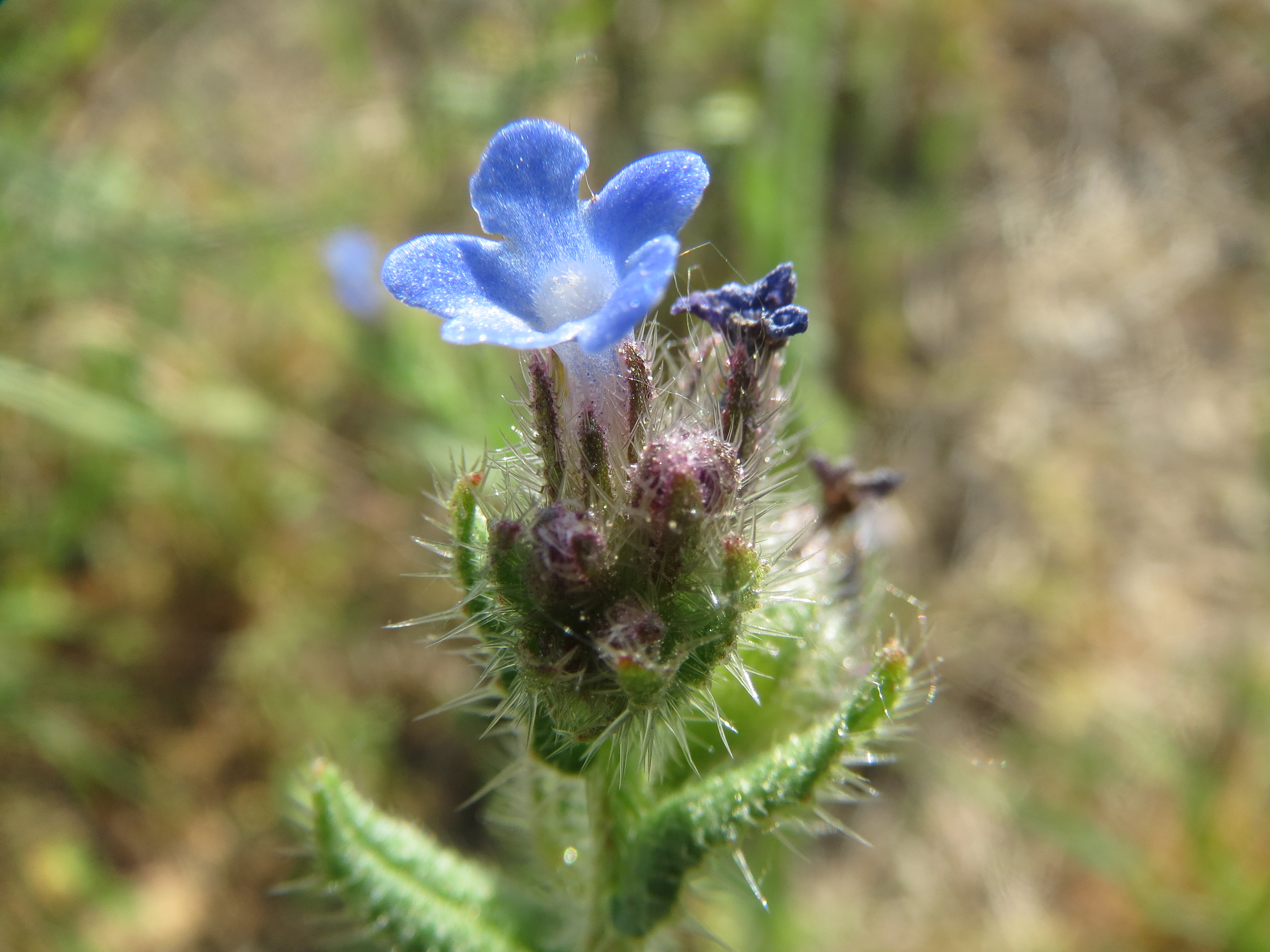 Acker-Ochsenzunge (Anchusa arvensis) im Hockenheimer Rheinbogen